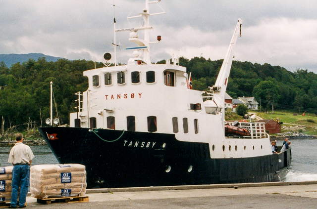 MS Tansøy ved Flokenes i 1999